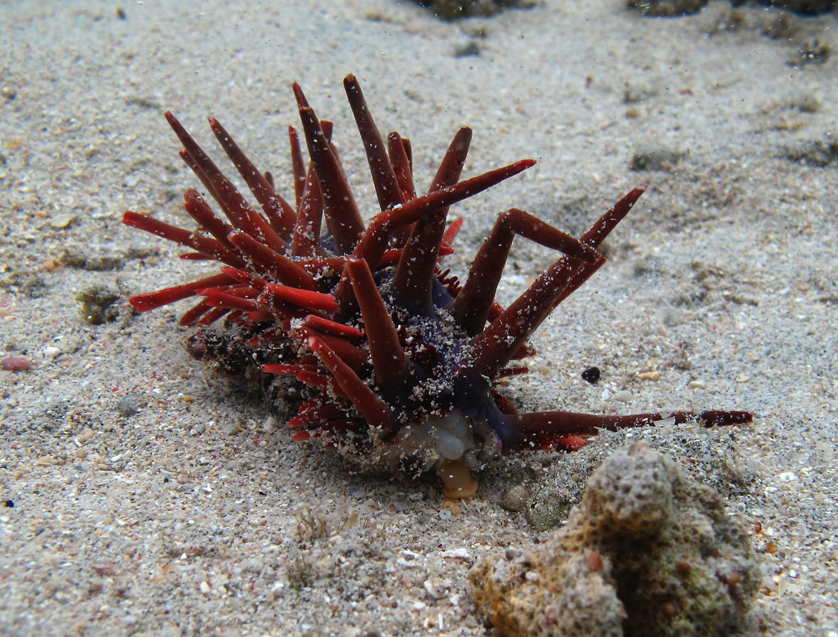 Un tronçon de bras d'étoile de mer Acanthaster planci victime de prédation.